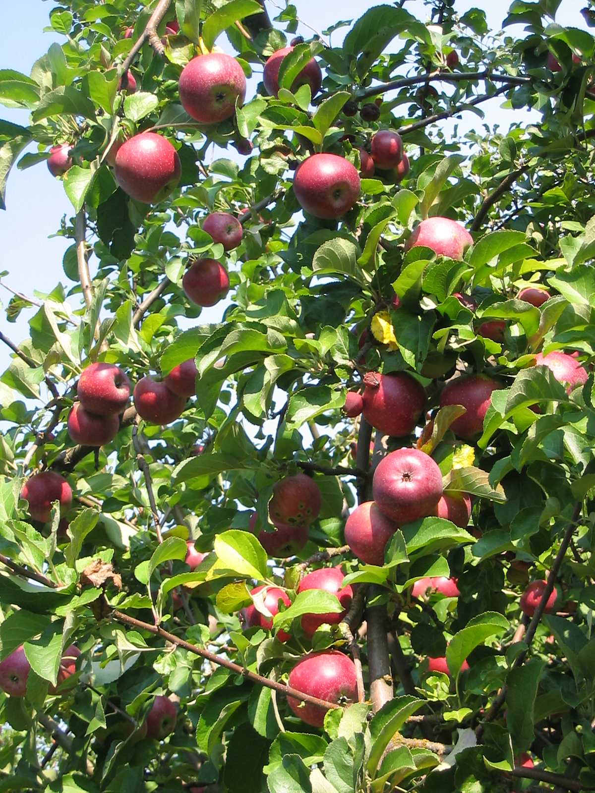 Корочанские сады. Из коллекции экологической организации «Родники Белогорья».